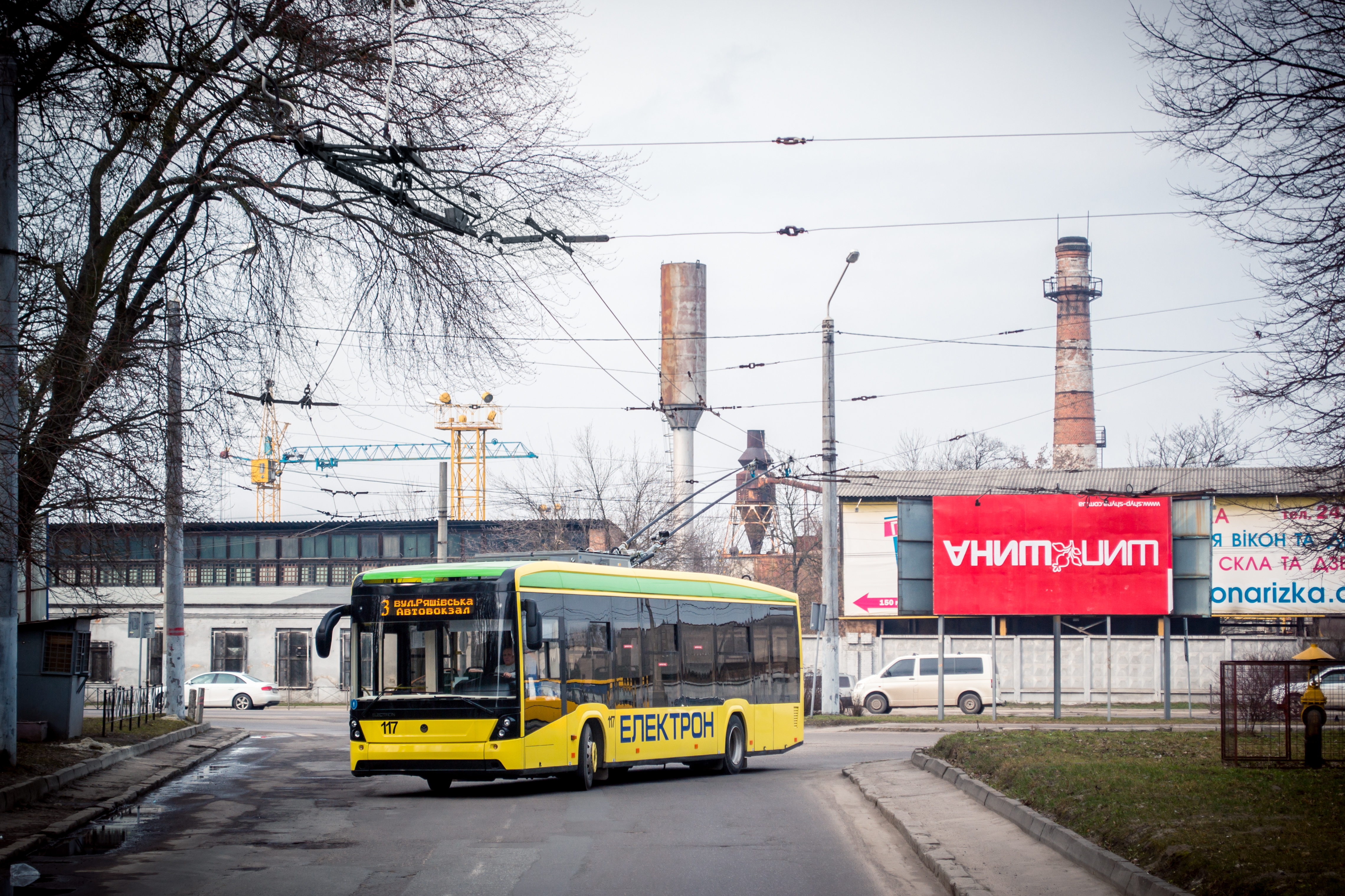 Lviv.Ukraine.Ryashivska str. Electron T19102 .